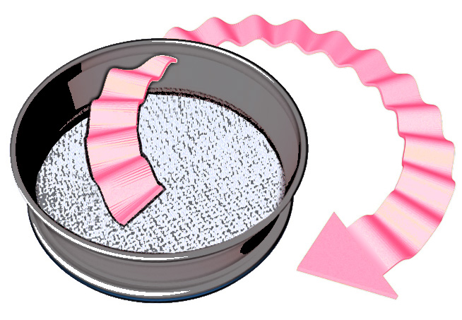 Klopfsiebung, Siebanalyse, Sieve analysis, sieve shaker, tap